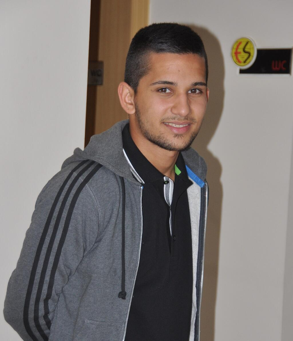 Bertul Kocabaş